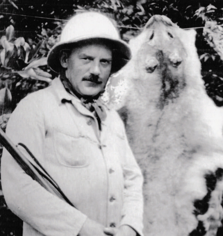 Josef Ladislav Erben (1888-1958), český cestovatel, prospektor a spisovatel